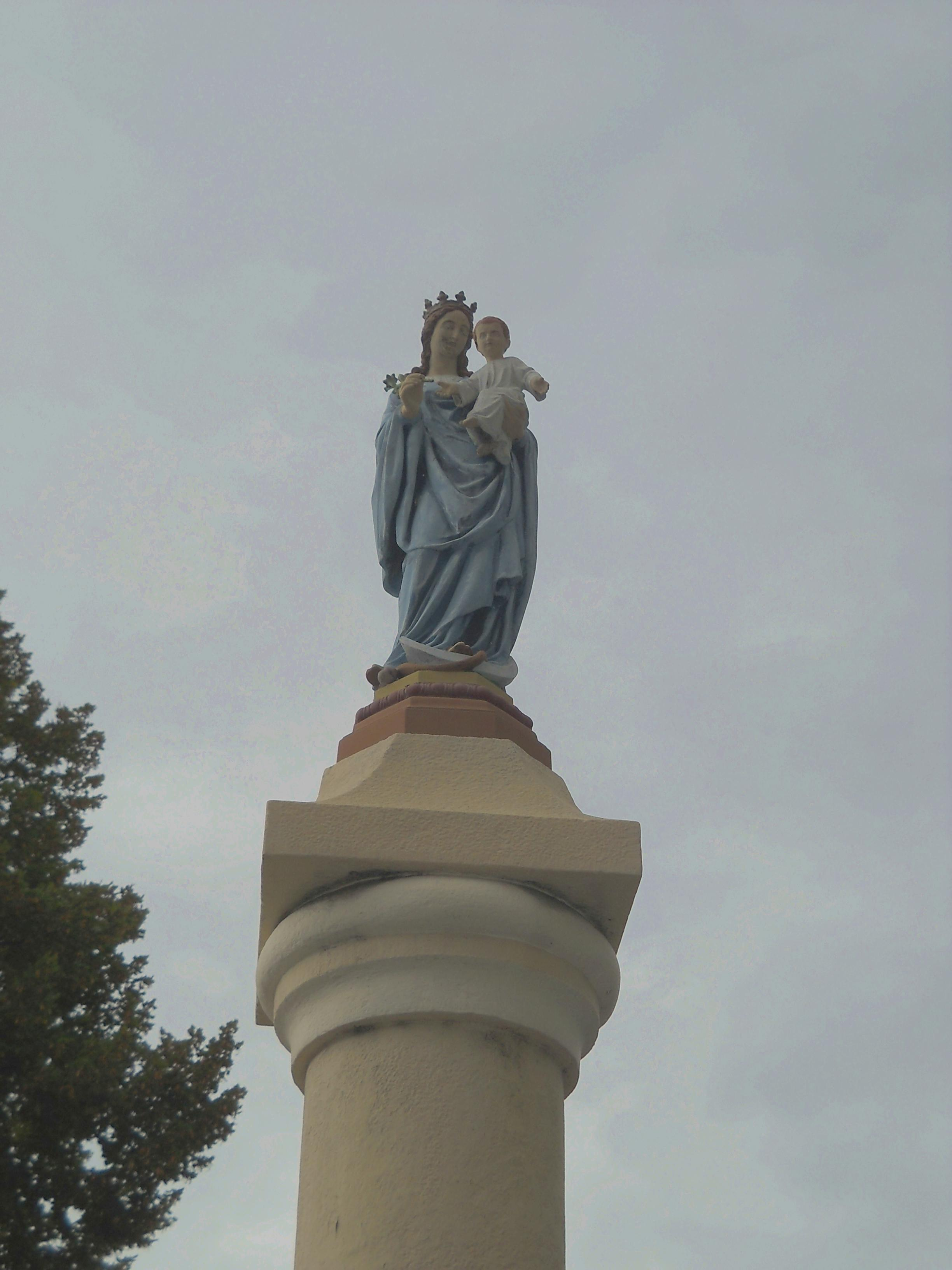 Pyskowice, ul. Poniatowskiego 10 - kościół parafialny pw. św. Mikołaja, kolumna maryjna, tablica (zabytek nr A/289/60 z 7.03.1960)